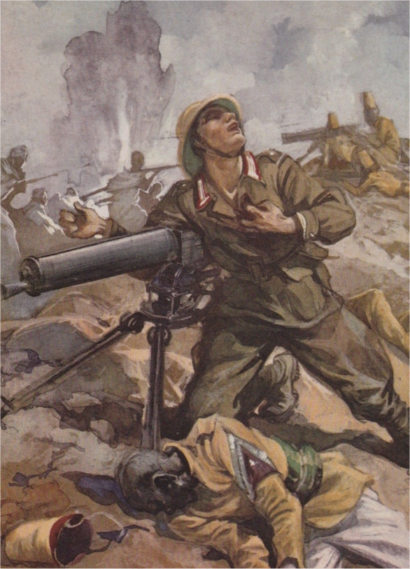 DA cartolina collezione privata Luigi Michelazzi medaglia d'oro al valor militare